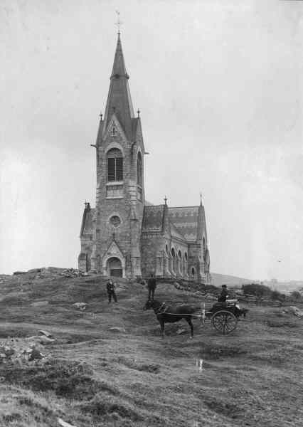 Kyrkan från väster. Kategori: (01) ExteriörerKyrkan från väster.